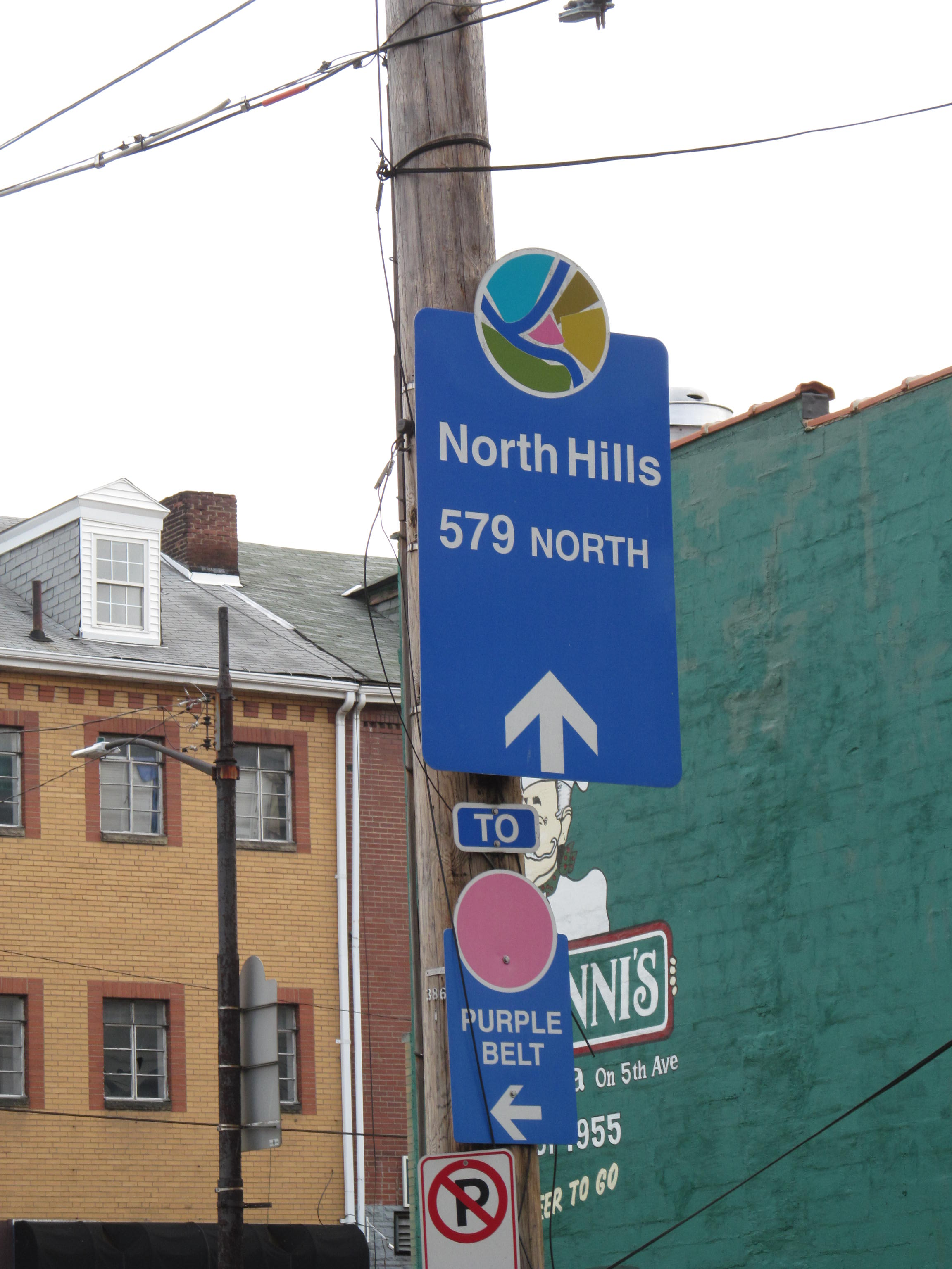 Pittsburgh, Pennsylvania